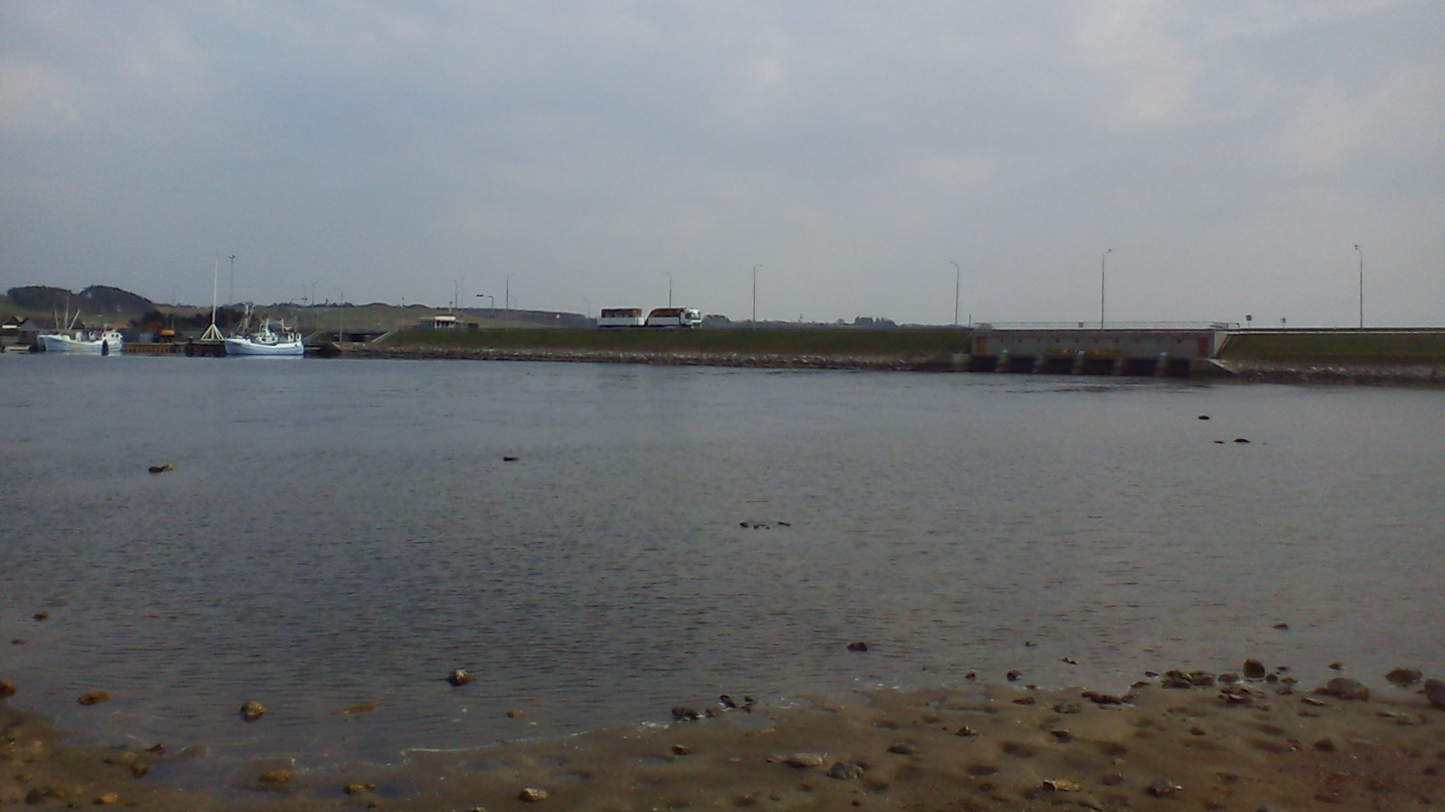 Virksunddæmningen det fra nordvest